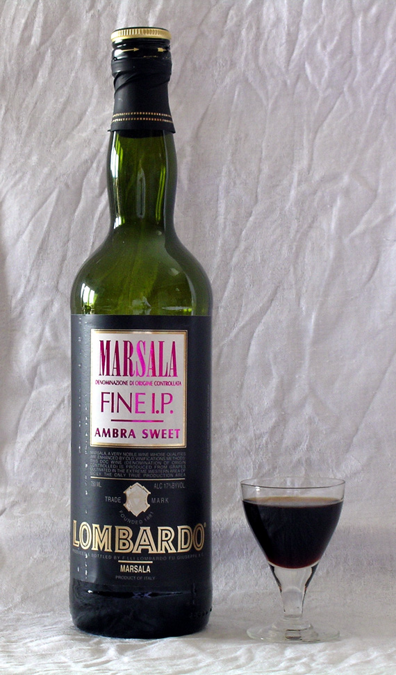 Marsala wine, casa vinicola Lombardo, Marsala, Sicily, Italy.